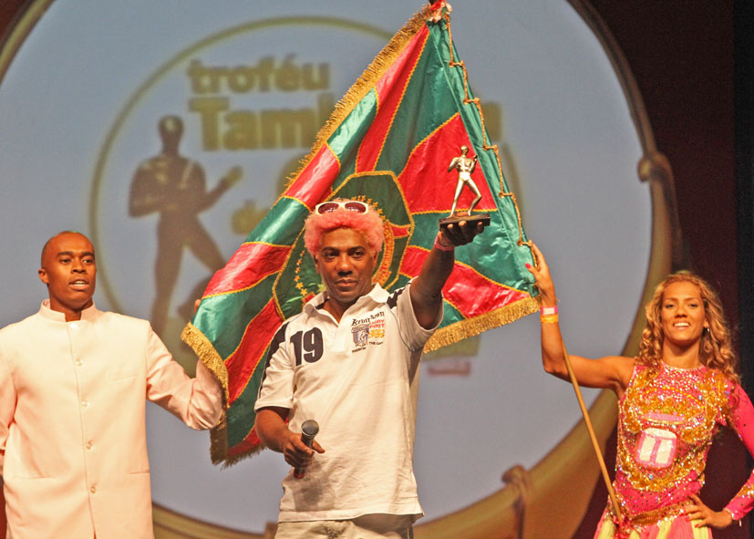 Fotógrafo Henrique Matos